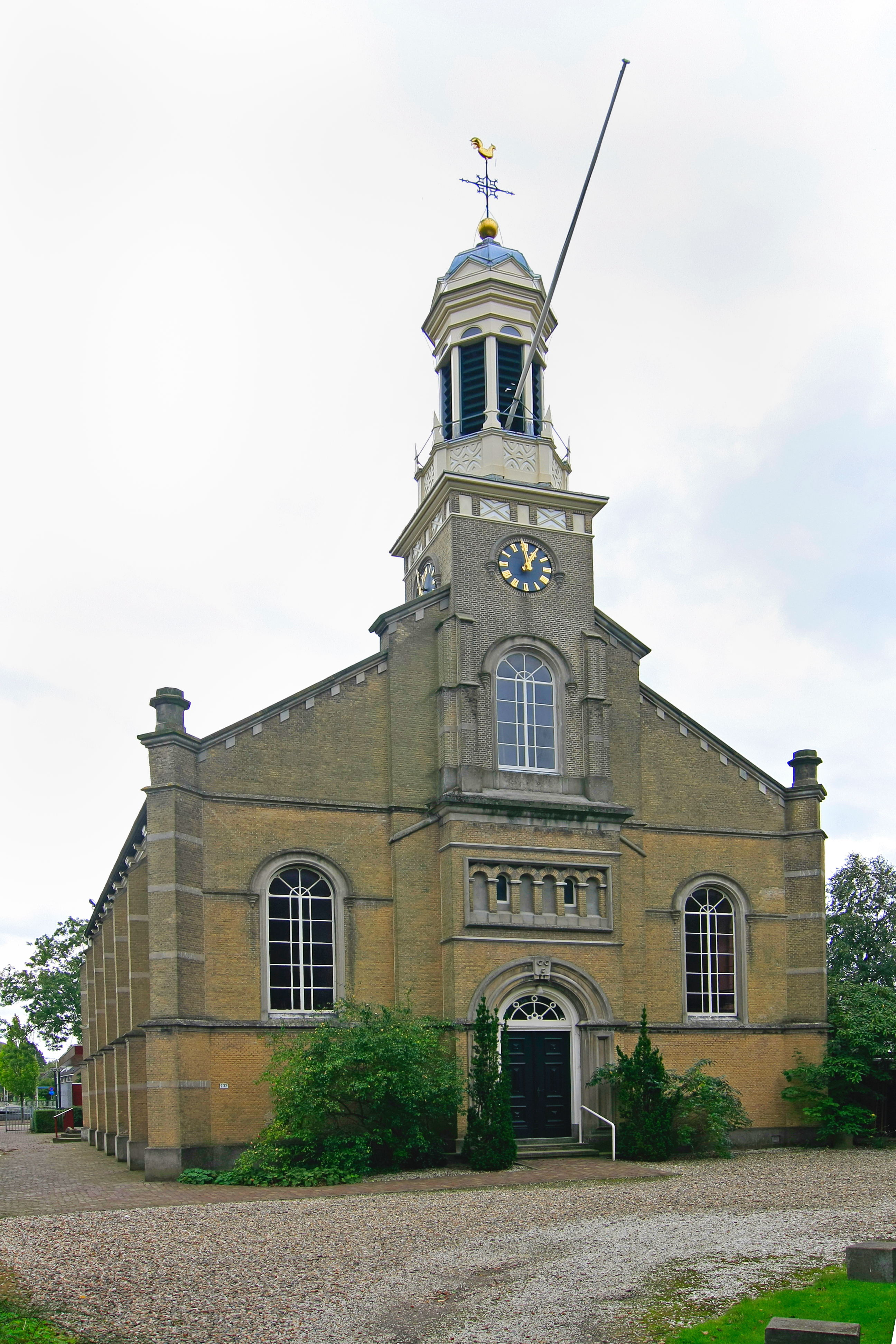 Nederlands Hervormde kerk aan de IJsseldijk te Krimpen aan de IJssel